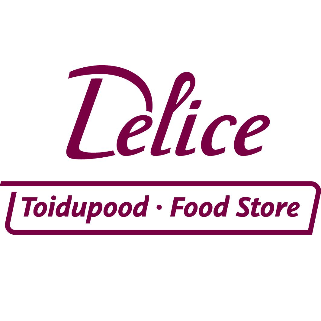 Delice Toidupood logo